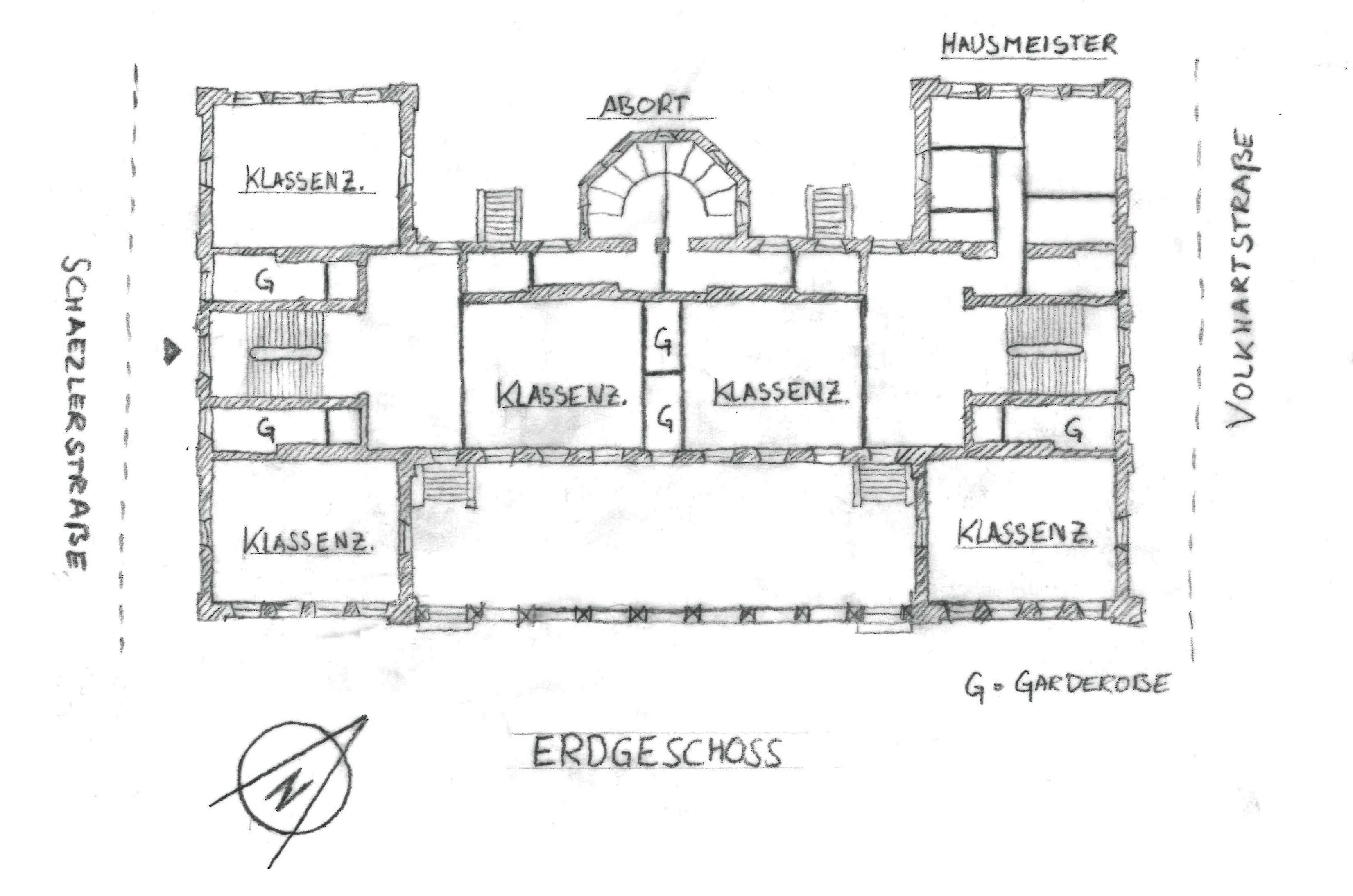 Grundriss 1873 St.-Anna-Grundschule Augsburg